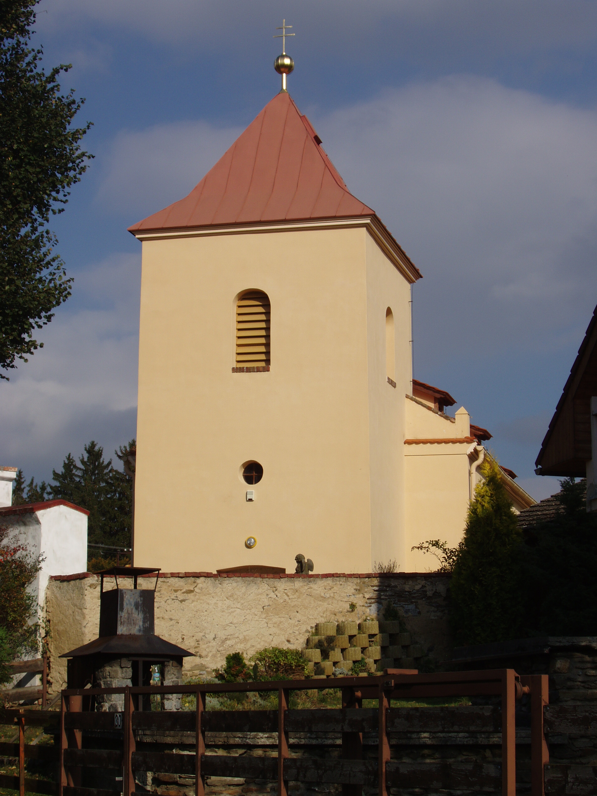 Kostel sv. Václava (Jindice), Jindice